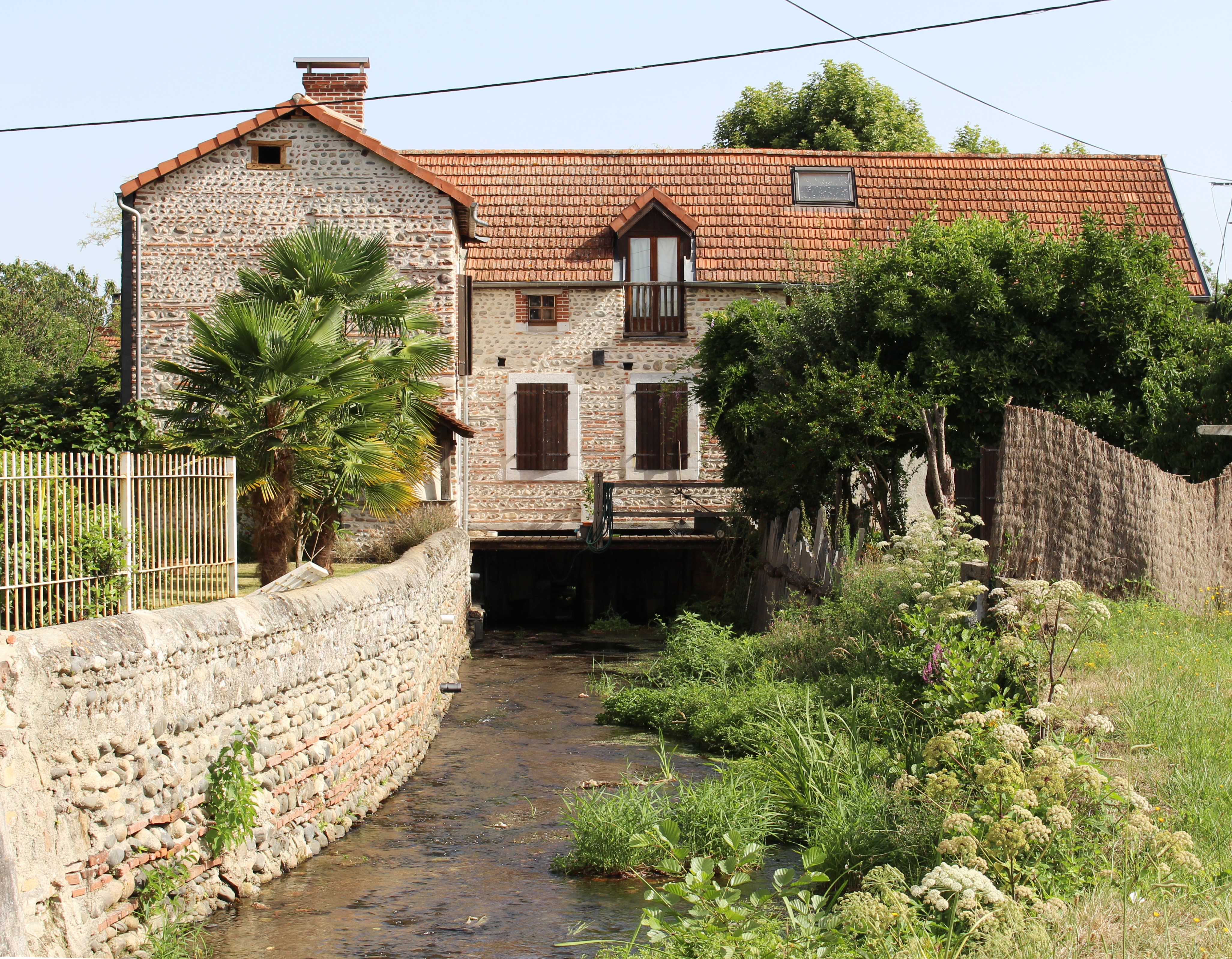 Moulin de Gayan (Hautes-Pyrénées)